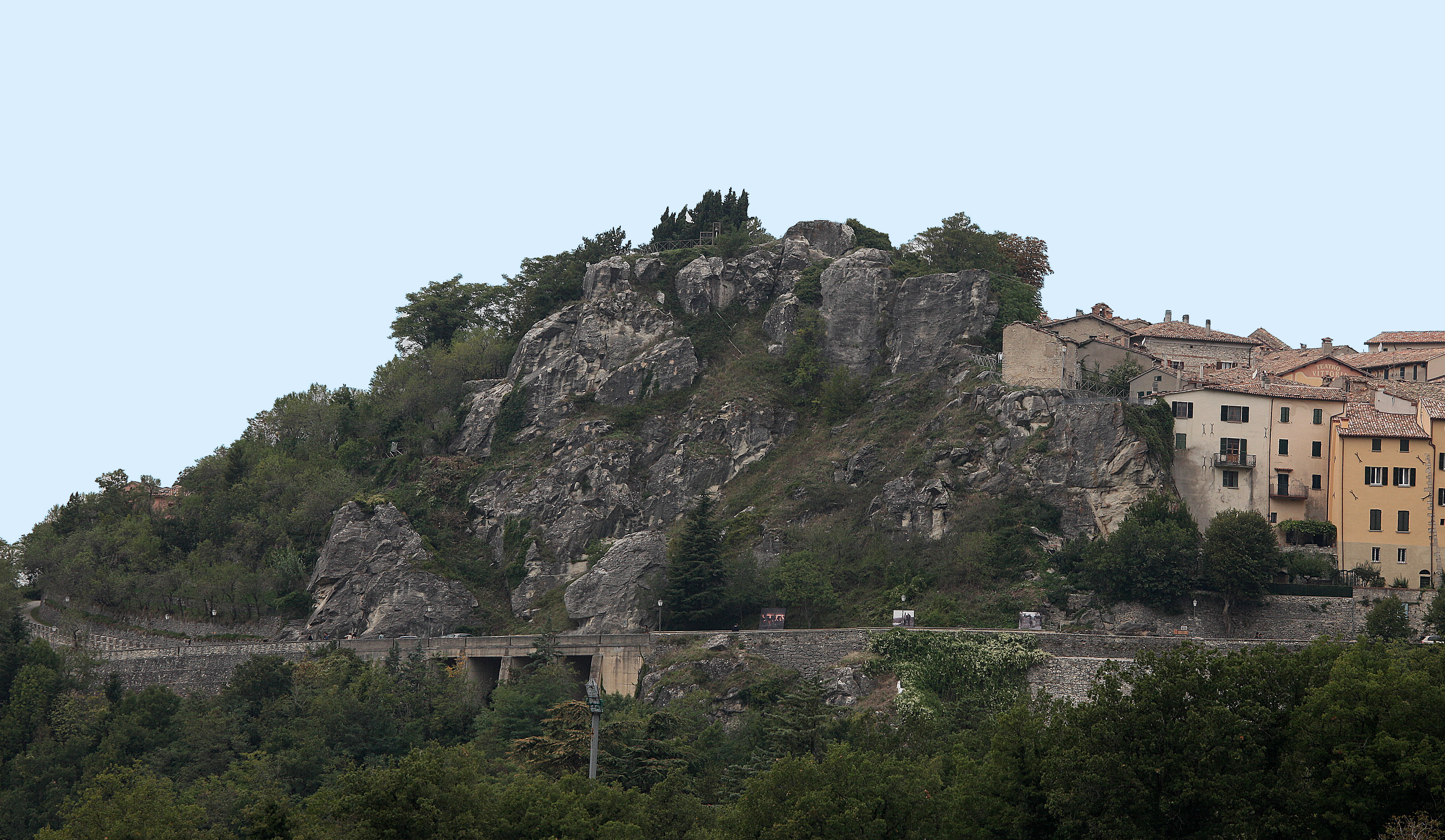 Mura Malatestiane e Torrioni - MIBAC This is a photo of a monument which is part of cultural heritage of Italy.